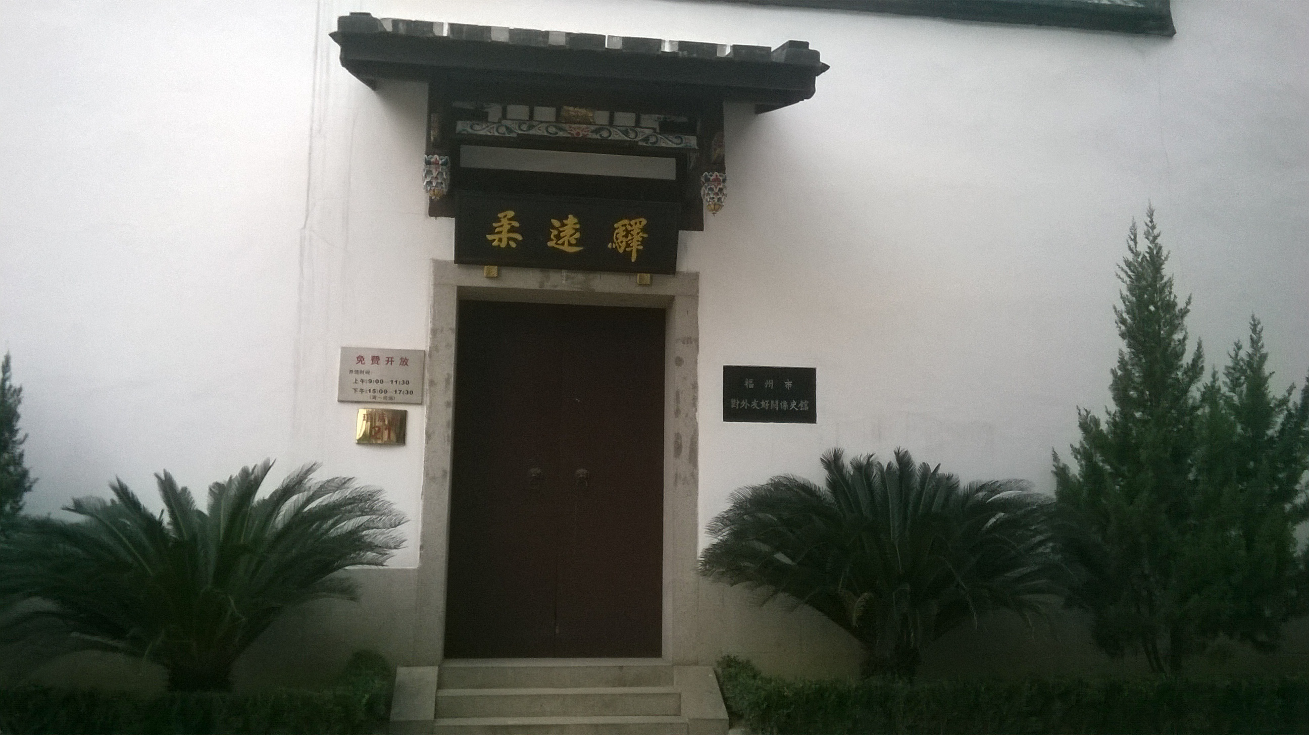 中國福州的柔遠驛（又名琉球館）